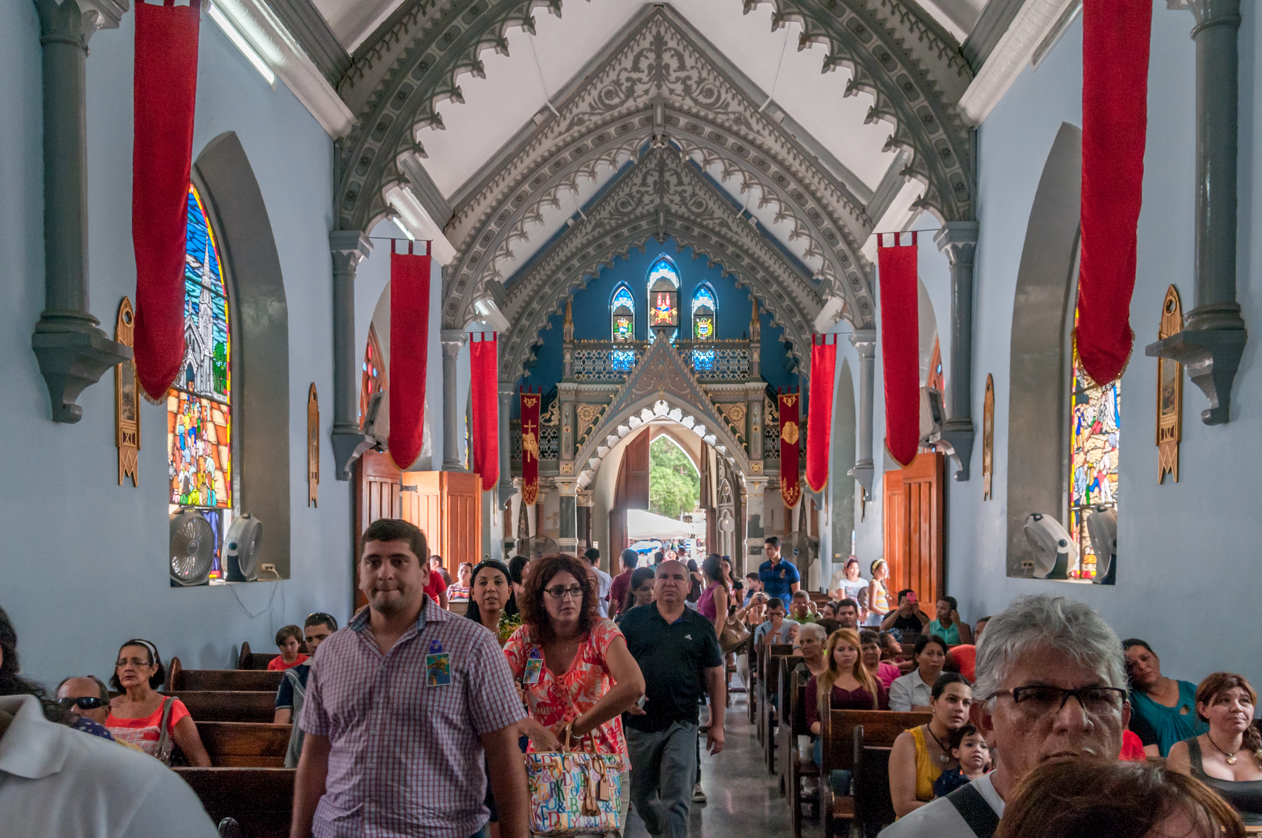 Catedral Nuestra Señora de La Asunción